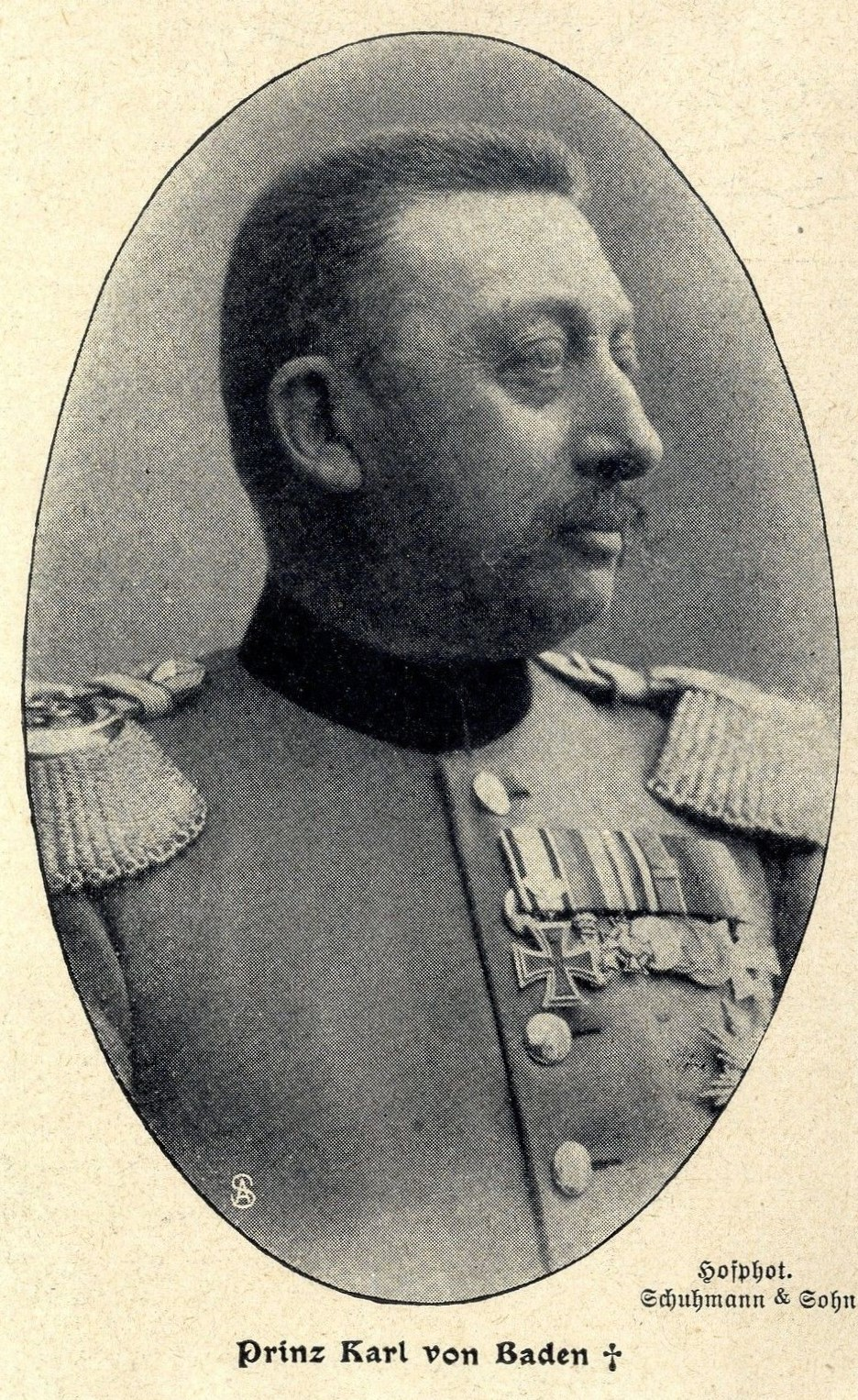 Prinz Karl von Baden gestorben, 1906